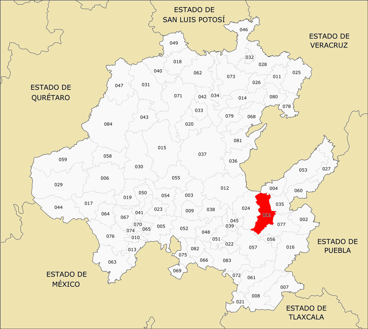 001 Municipio de Hidalgo